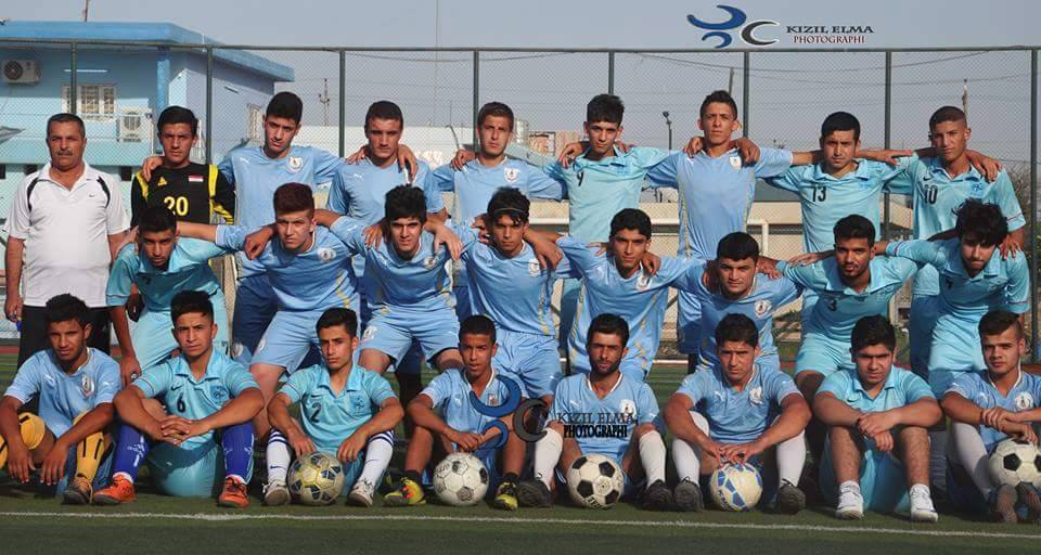 فريق شباب نادي التركمان الرياضي